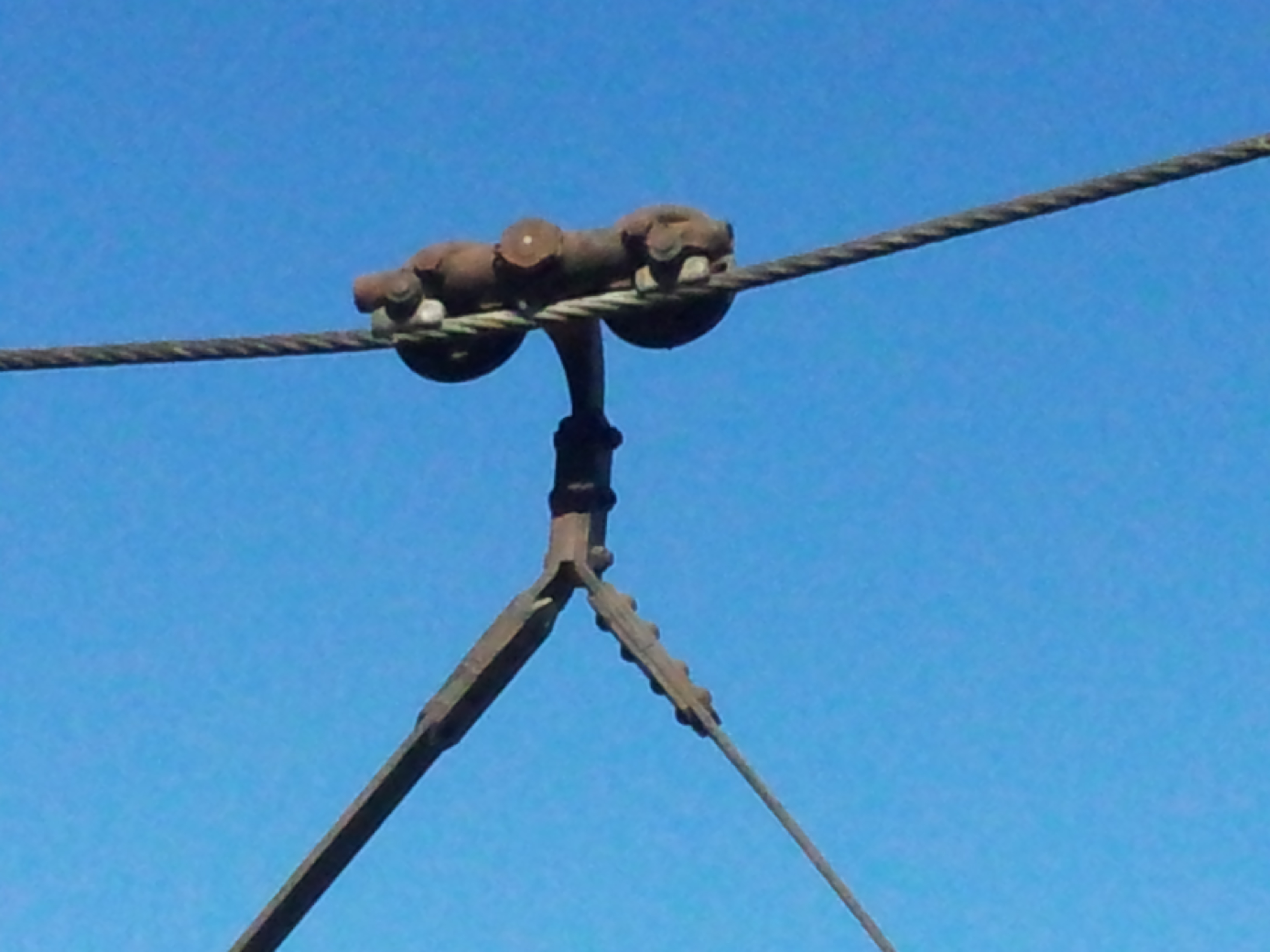 Détail du système de pose d'une benne sur le câble de l'ancien transporteur aérien Maxéville-Dombasle exposé à l'entrée de la carrière Solvay de Saint-Germain-sur-Meuse.